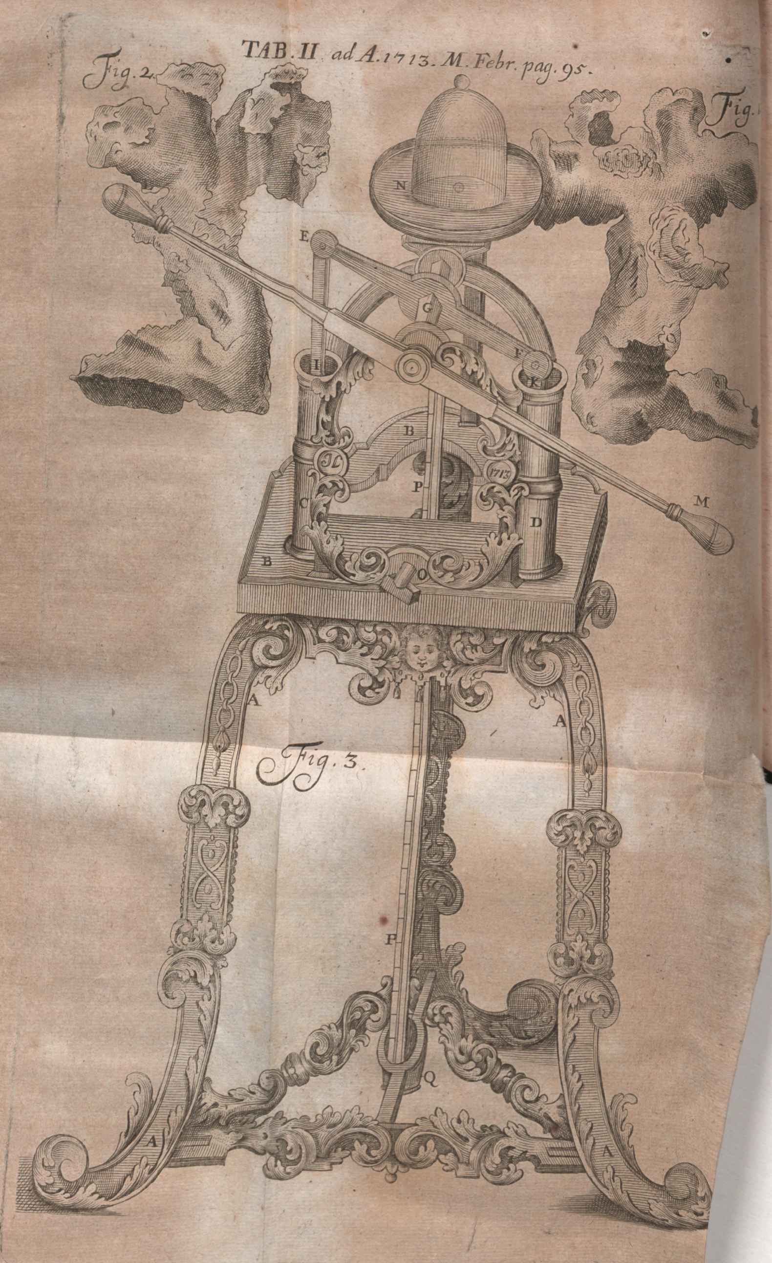 Illustration